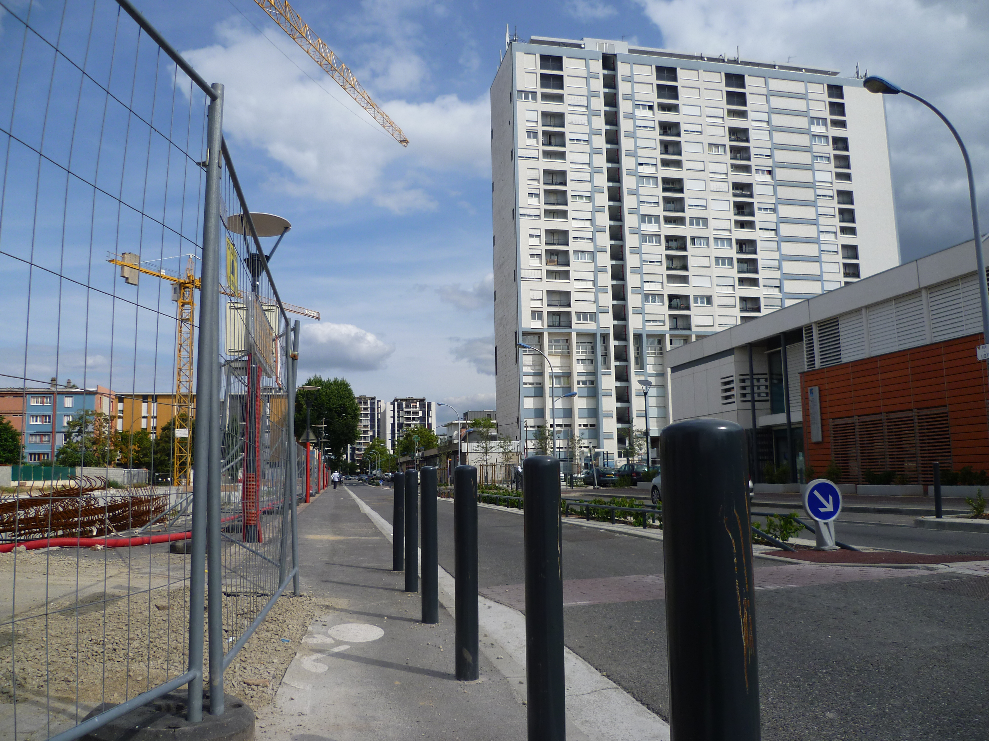 La rue du Lot à Toulouse (Haute-Garonne, France).